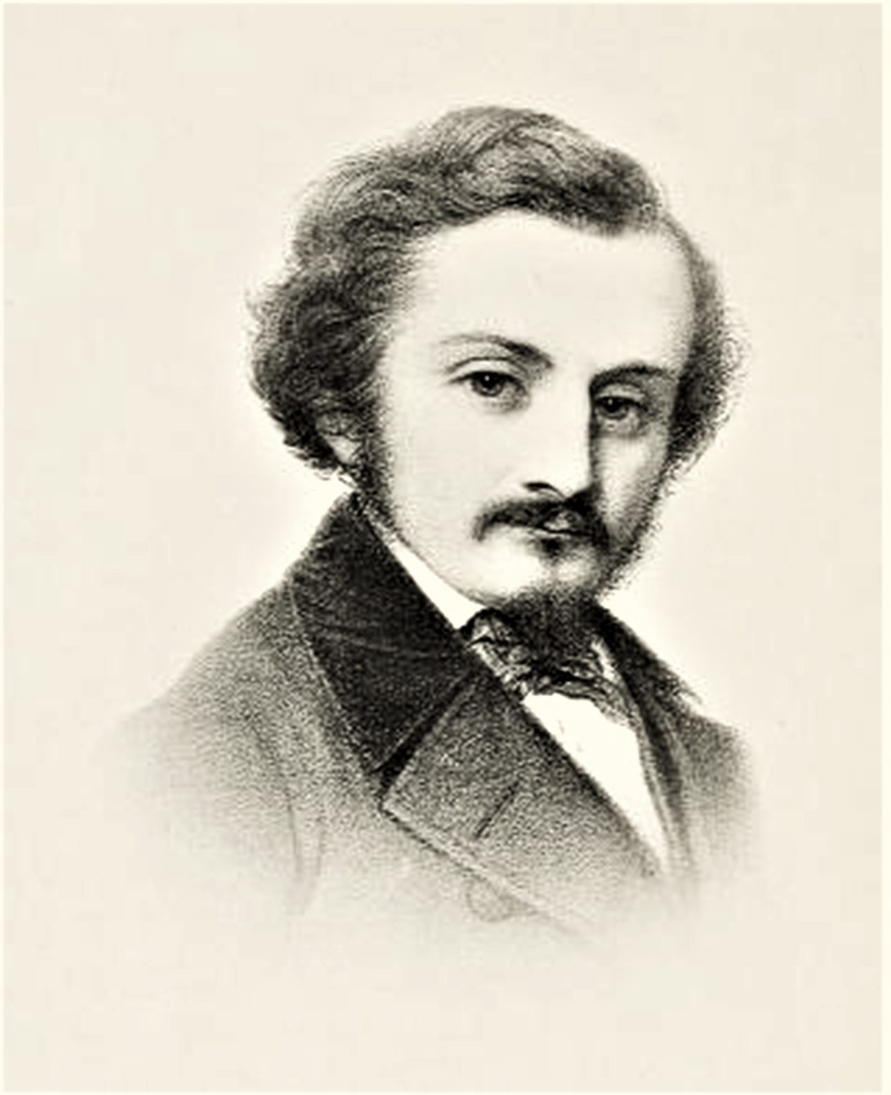 Louis-Adolphe Bertillon (1821-1883) Anno 1850, Lithographie von M. Panier